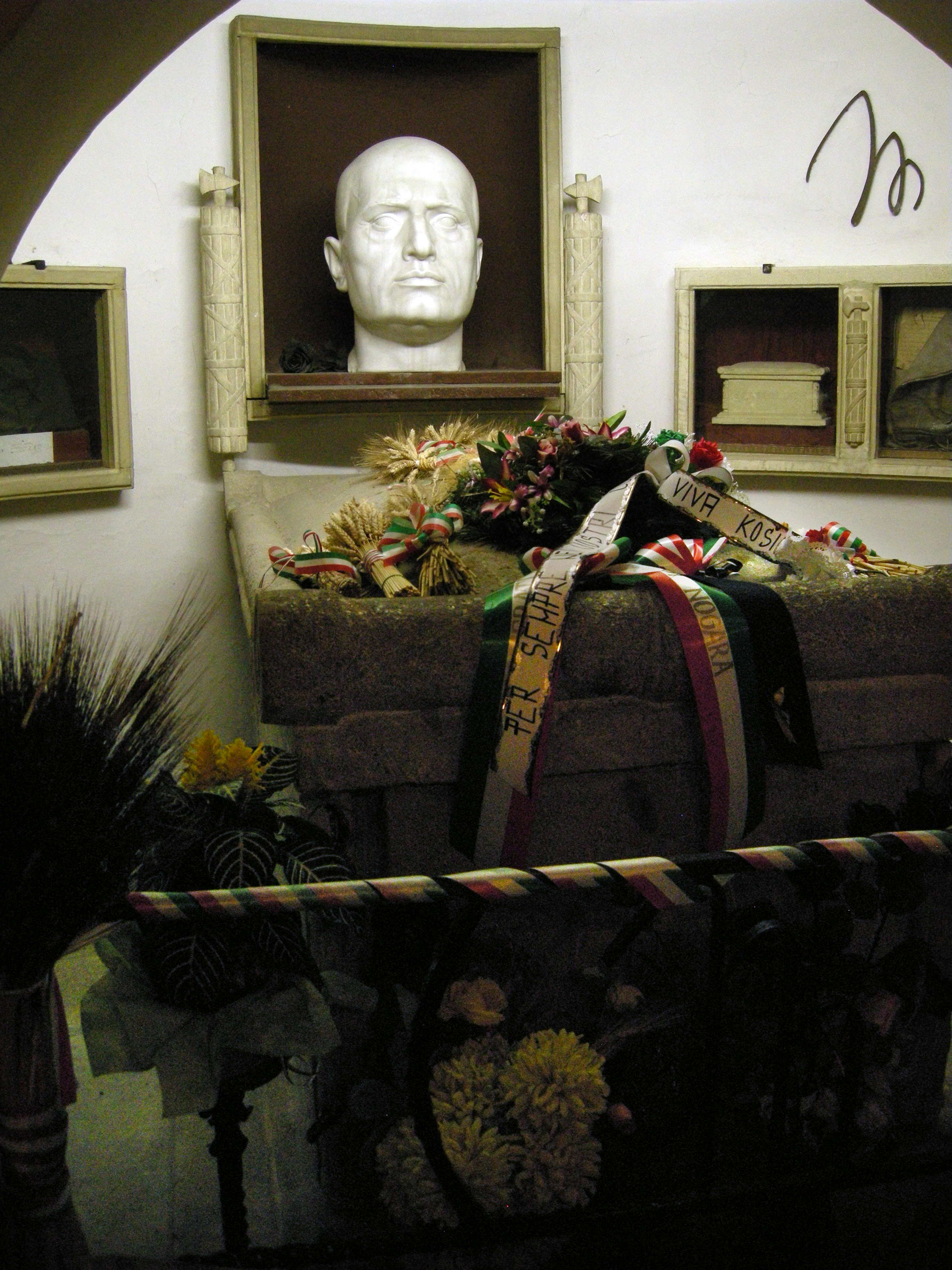 Cripta del cimitero di San Cassiano a Predappio, tombe della famiglia Mussolini